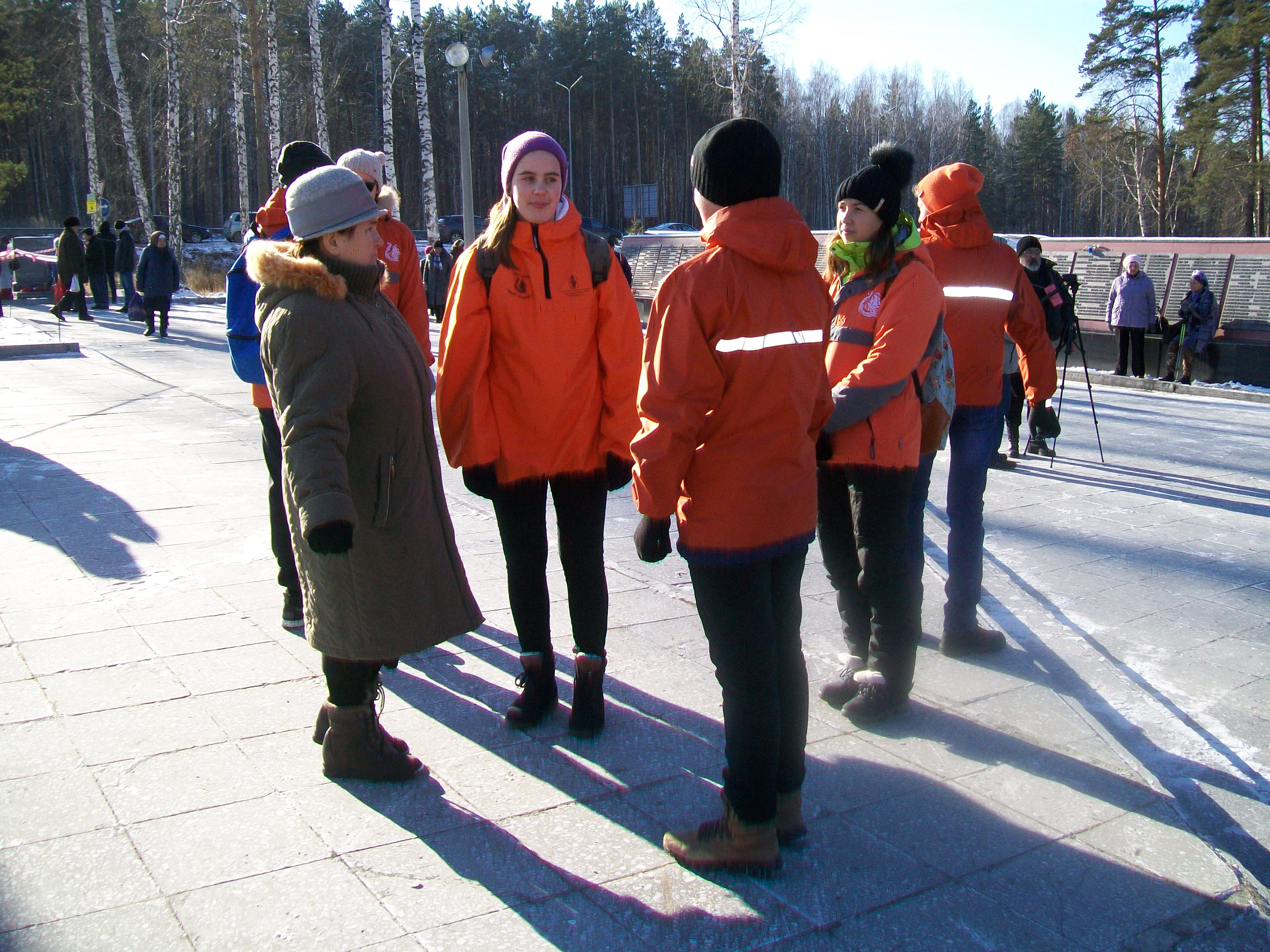 Волонтеры Каравеллы на Дне памяти жертв политических репрессий. Мемориал на 12-м километре Ново-Московского тракта. 29 октября 2017 года